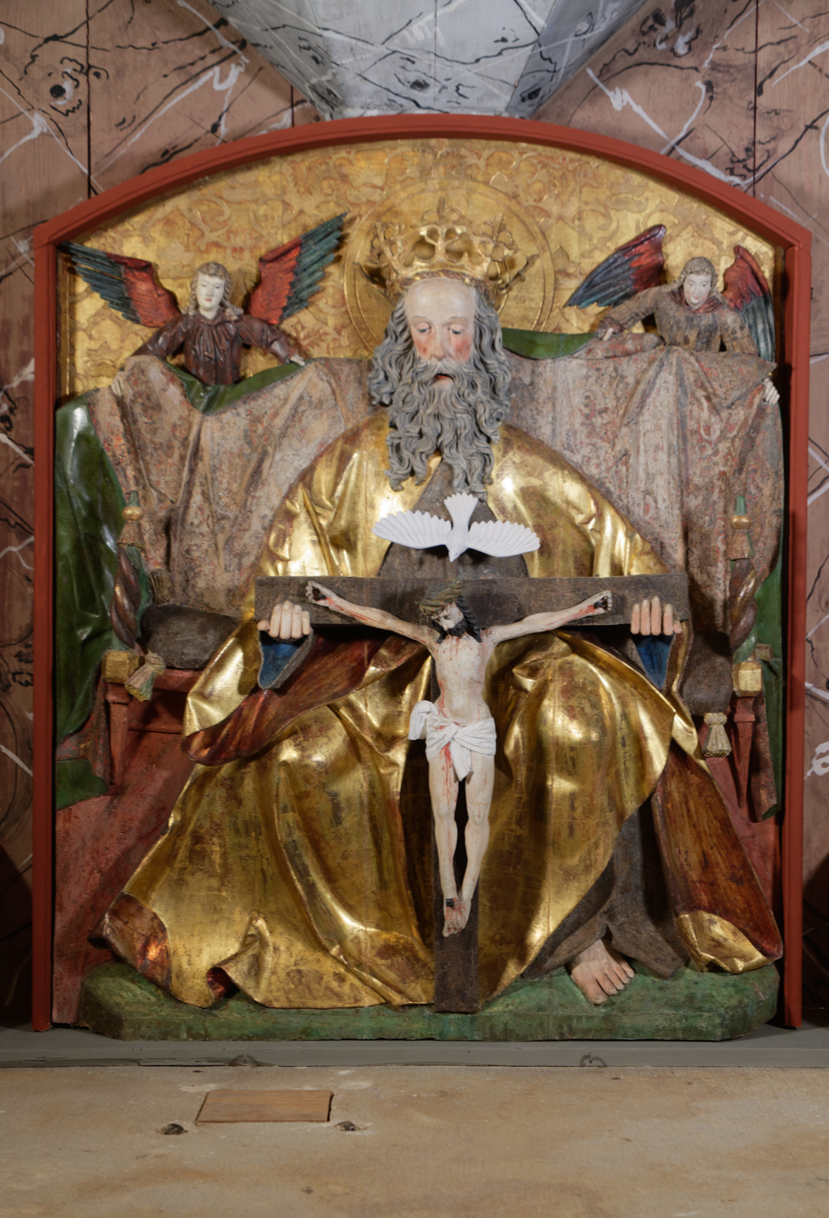 Gesamtansicht Gnadenstuhl, restauriert 2016